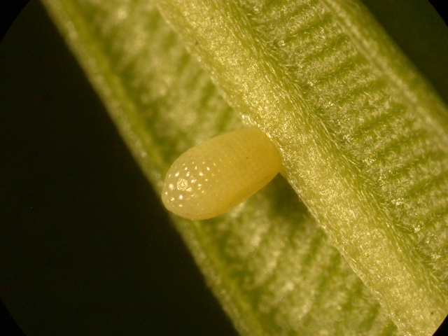 Euploea core eggs